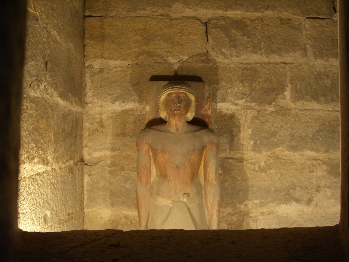 Statue de Ti trouvée dans le serdab de son mastaba ; il s'agit d'une copie, l'original étant exposée au Musée du Caire - Saqqarah ; Ve dynastie égyptienne